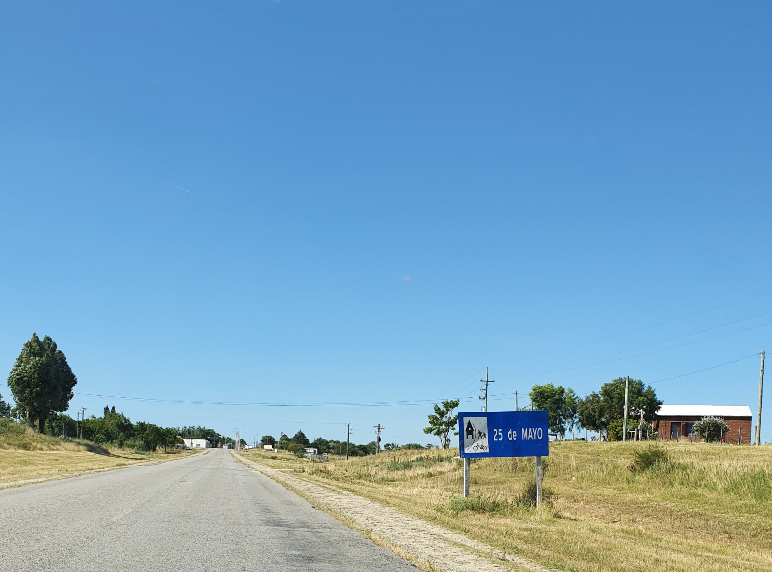 Ruta 76 próximo a Veinticinco de Mayo, Florida, Uruguay